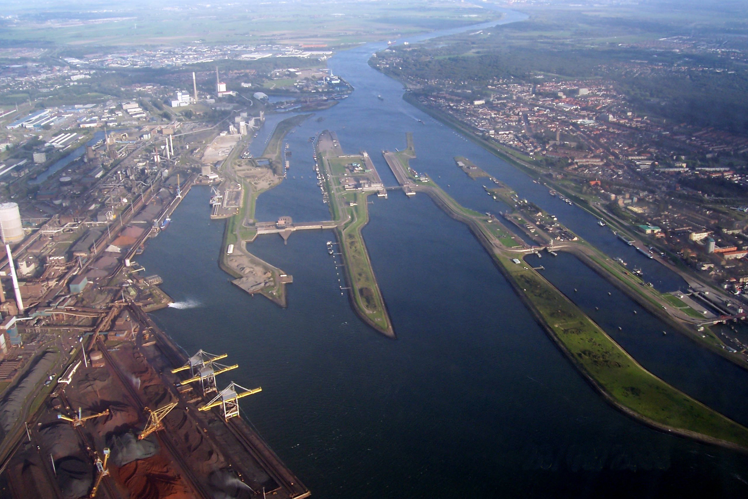 Categorie:Luchtfoto (Original text: Luchfoto van IJmuiden / sluis Noordzeekanaal)